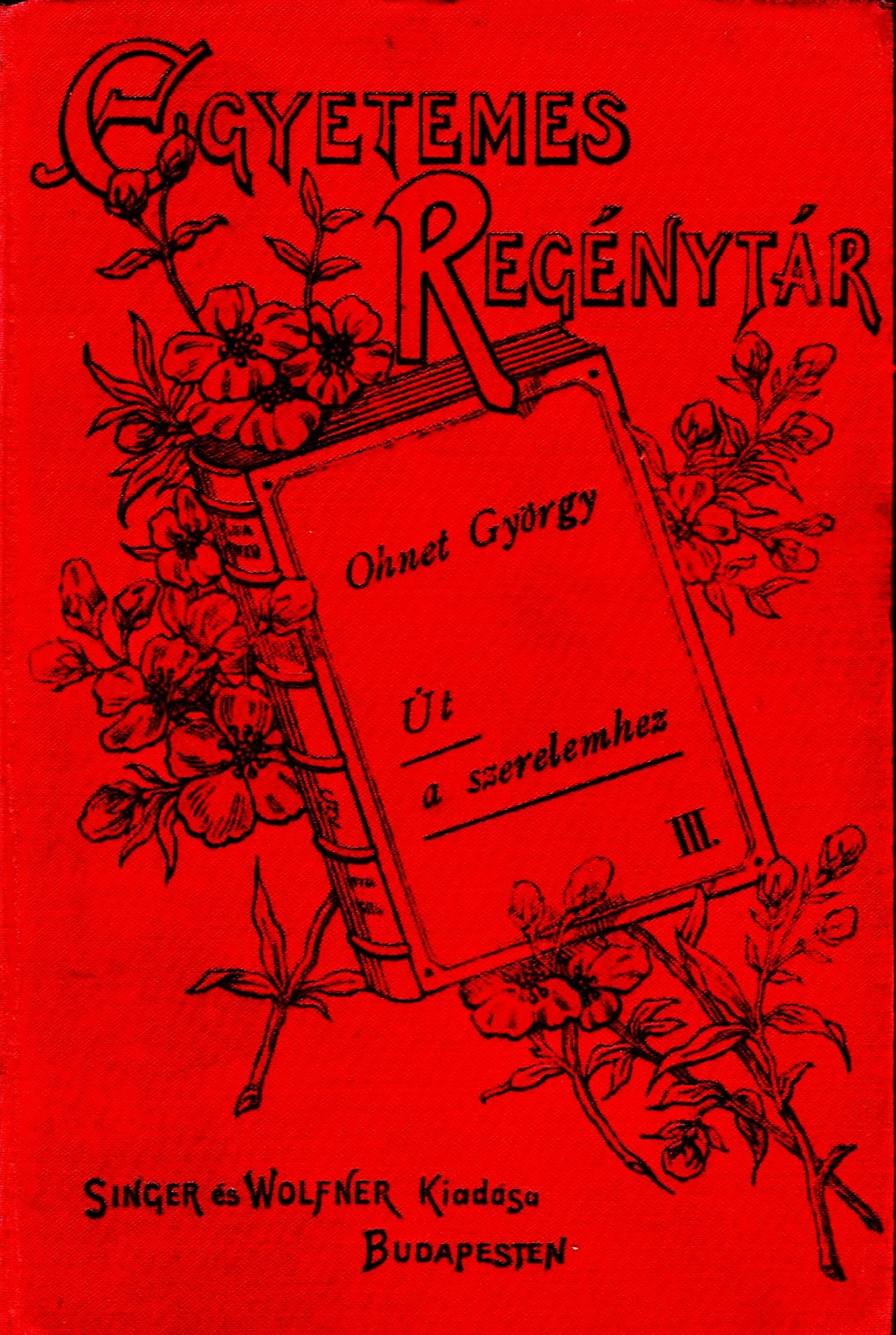 Ohnet György (George Ohnet): Út a szerelemhez, 1900 körül, borítódísz szerzője nem ismert